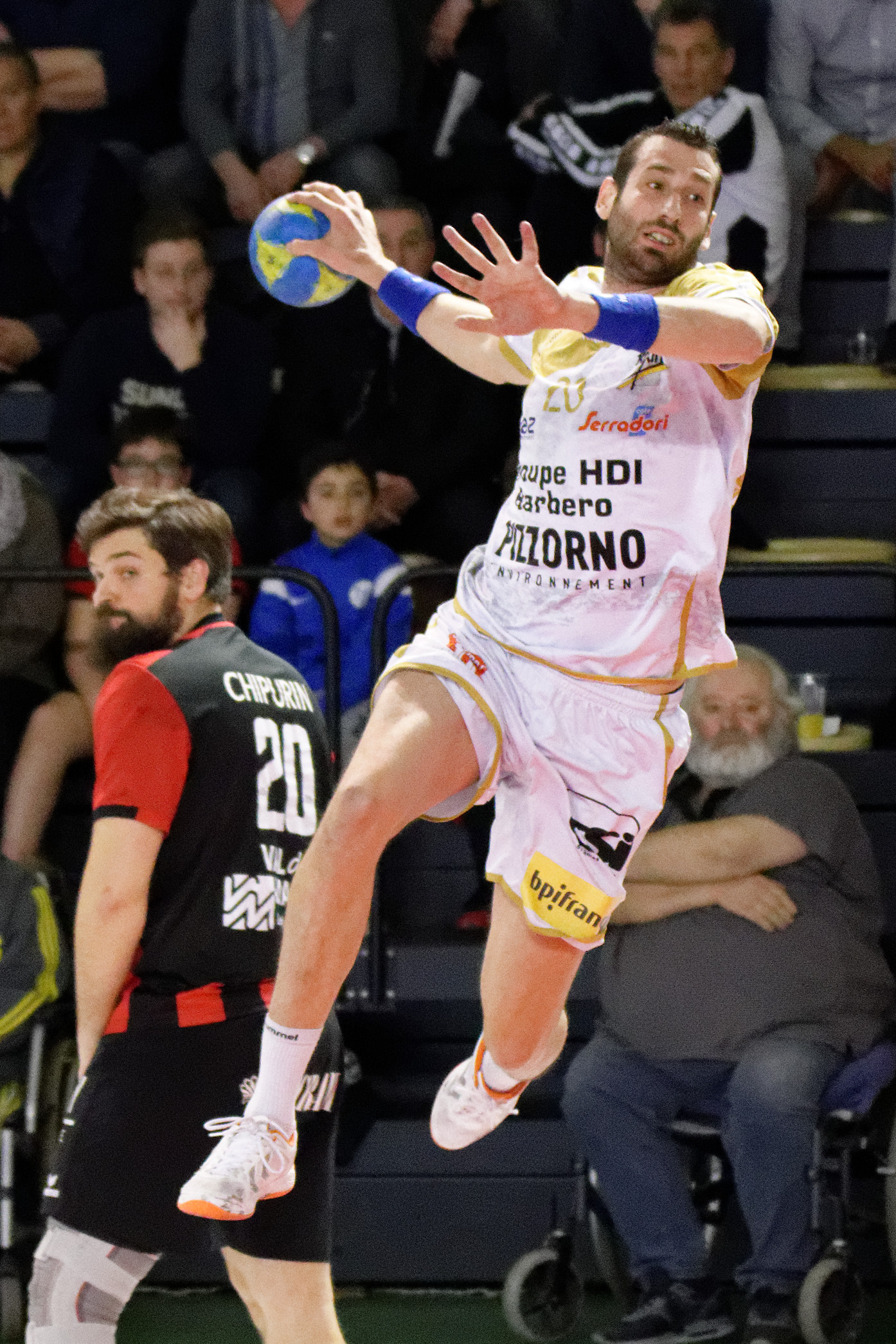 Ivry - Saint-Raphaël lors de la 19e journée du championnat de France de handball masculin le 23 mars 2016 au gymnase Auguste Delaune à Ivry sur Seine.